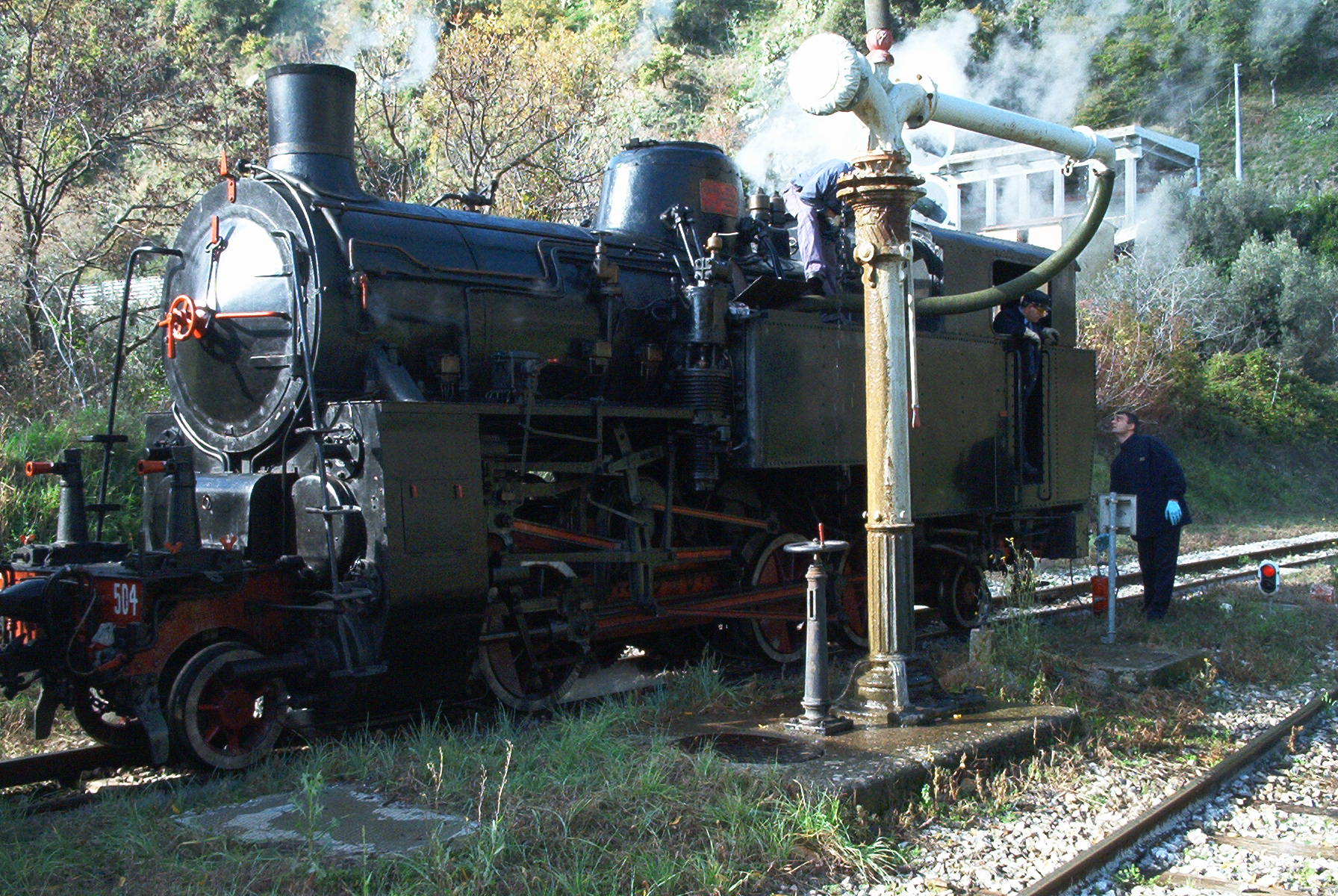 Rifornimento di acqua per la locomotiva FCL 504 a Gimigliano